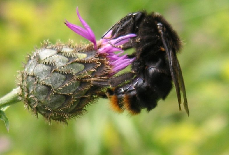 Felsenkuckuckshummel (Bombus rupestris) auf Flockenblume